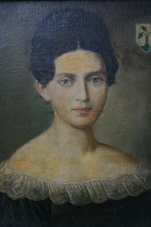 Ahnenbild in Öl